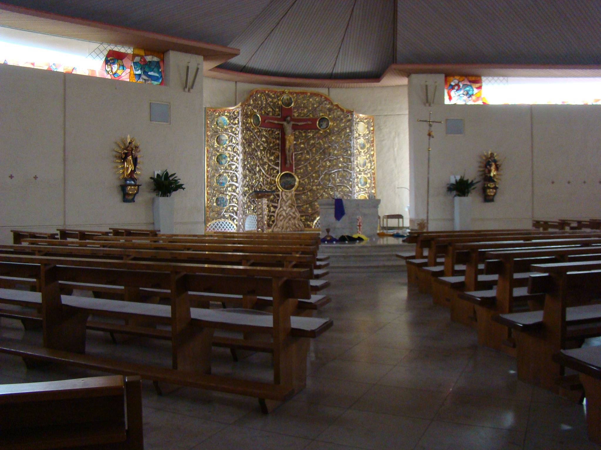 Katholische Kirche St. Michael in Wiesenbach / Baden, Südchor